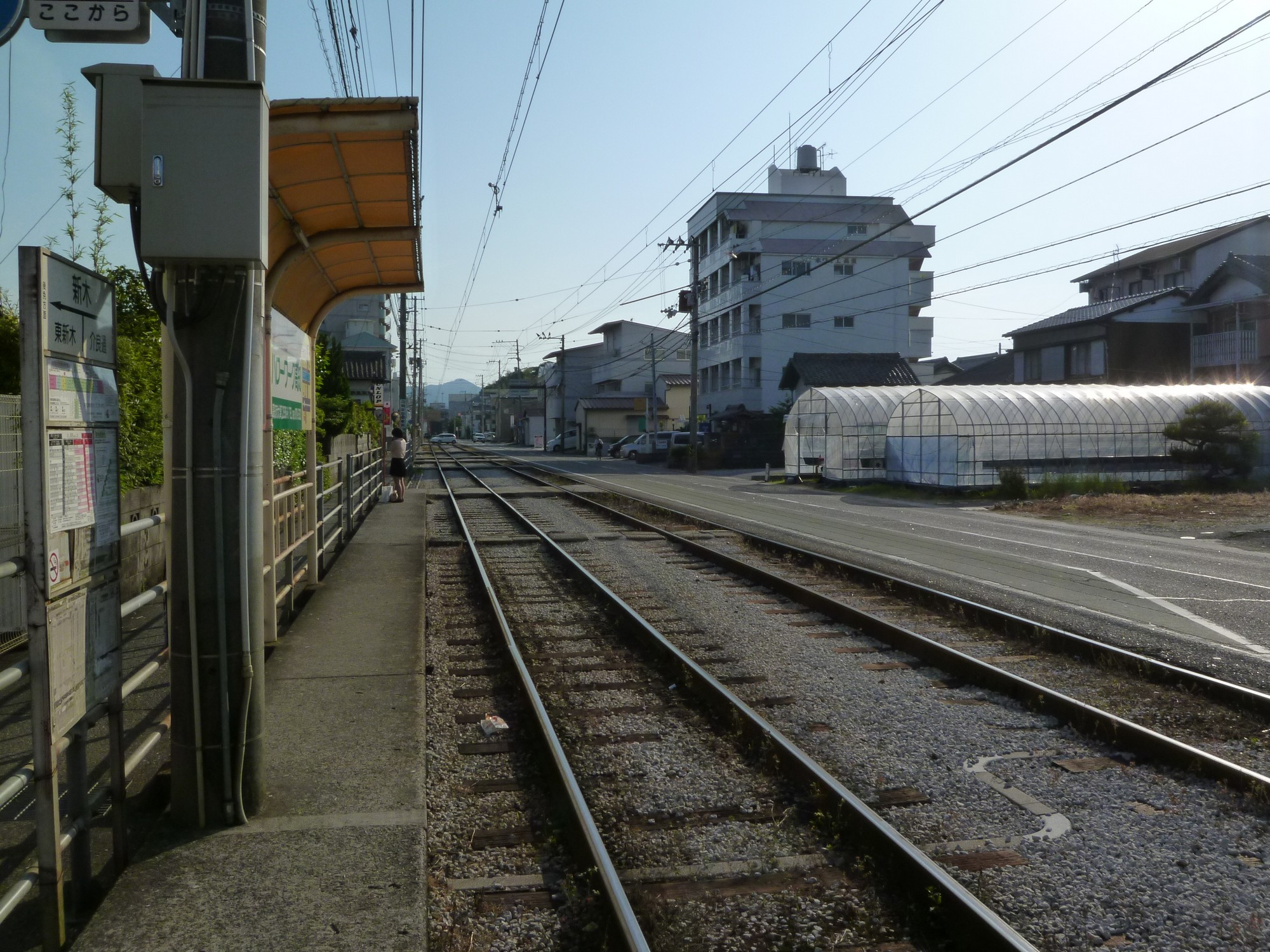 2015年5月8日撮影。